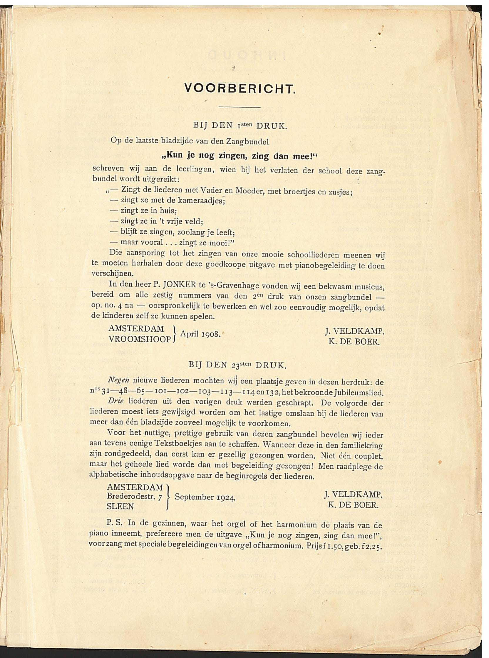 Kun je nog zingen, zing dan mee. Muziek en teksten origineel gepubliceerd voor 1900.